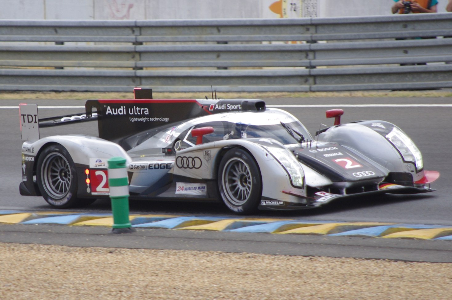 Audi R18 TDI, Le Mans 24 Hours 2011